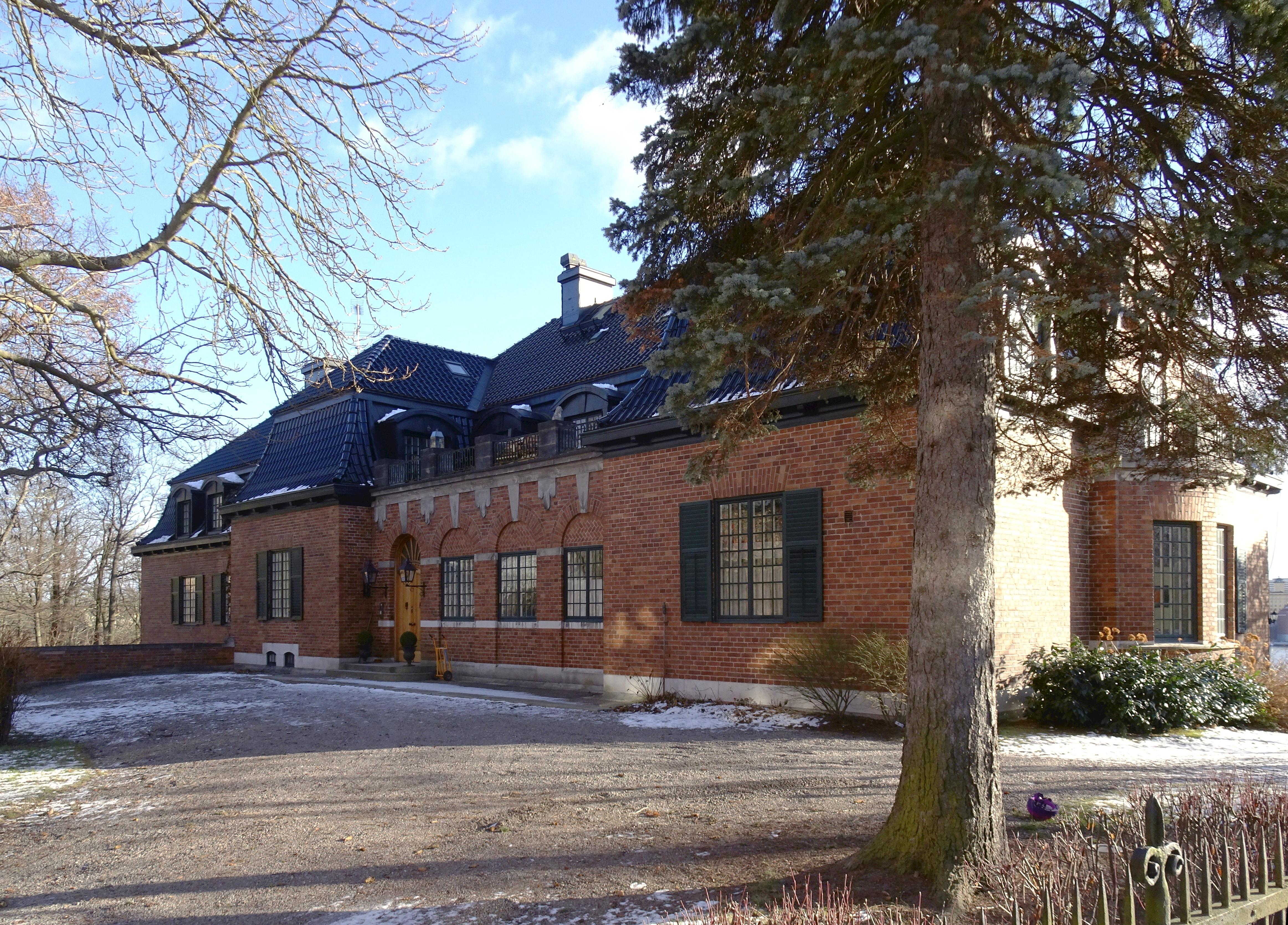 Villa Mariehill, Snigelbacken, Djurgården